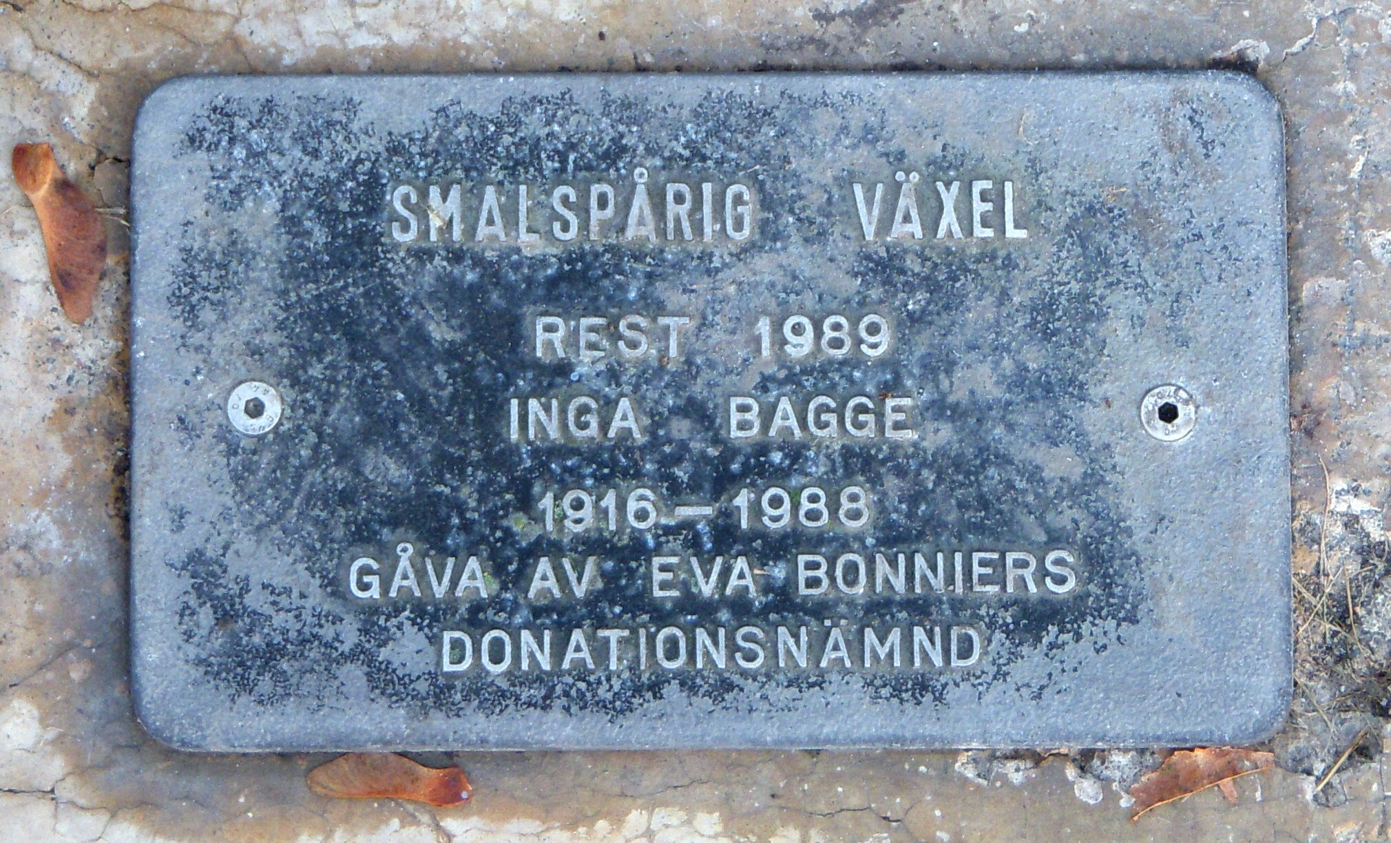 Inga Bagge: "Smalspårig Växel" på Smedsudden i Stockholm, skylt